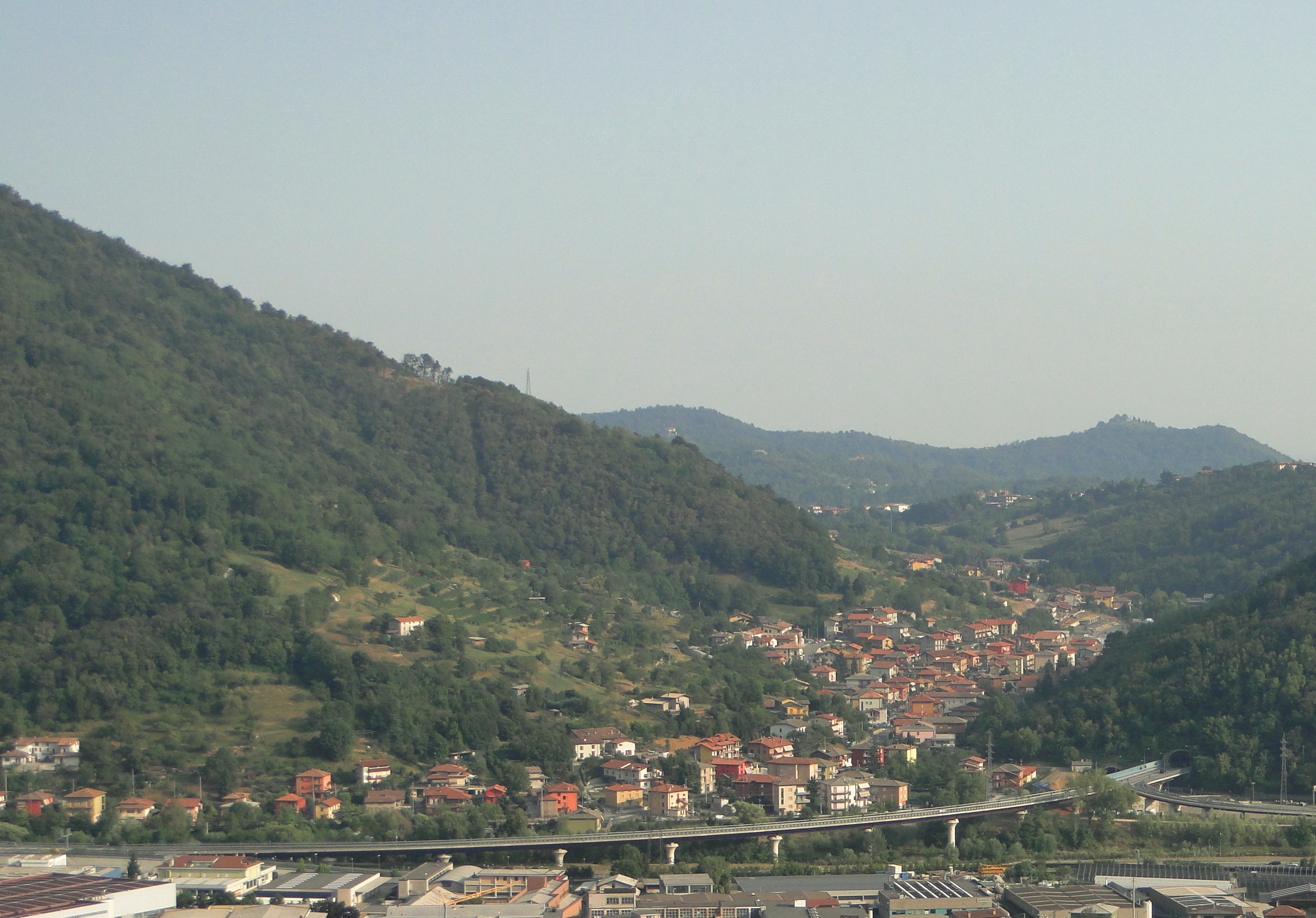 fraz. Gavarno, Nembro, Bergamo, Italy